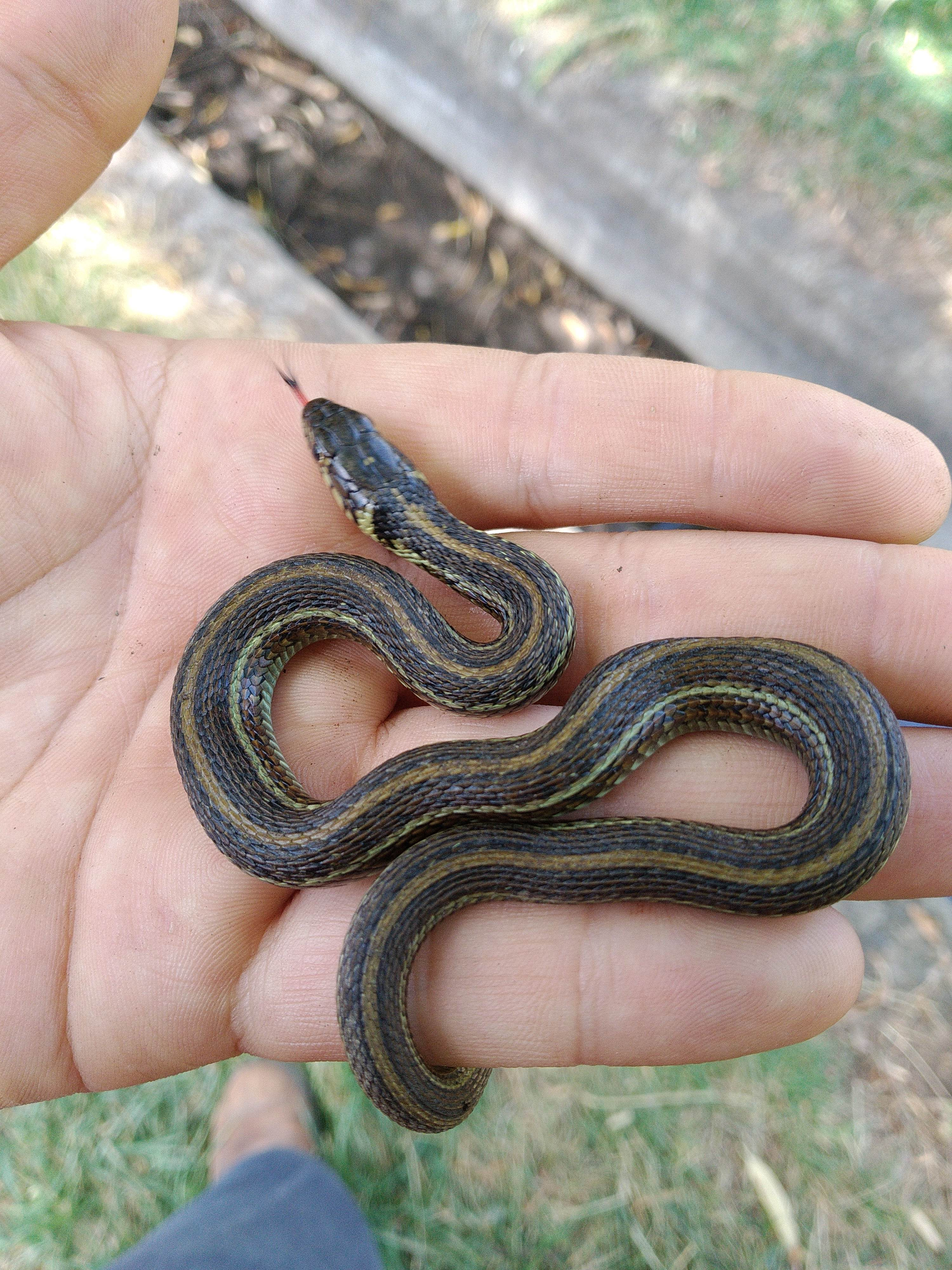 espécimen juvenil de Thamnophis eques